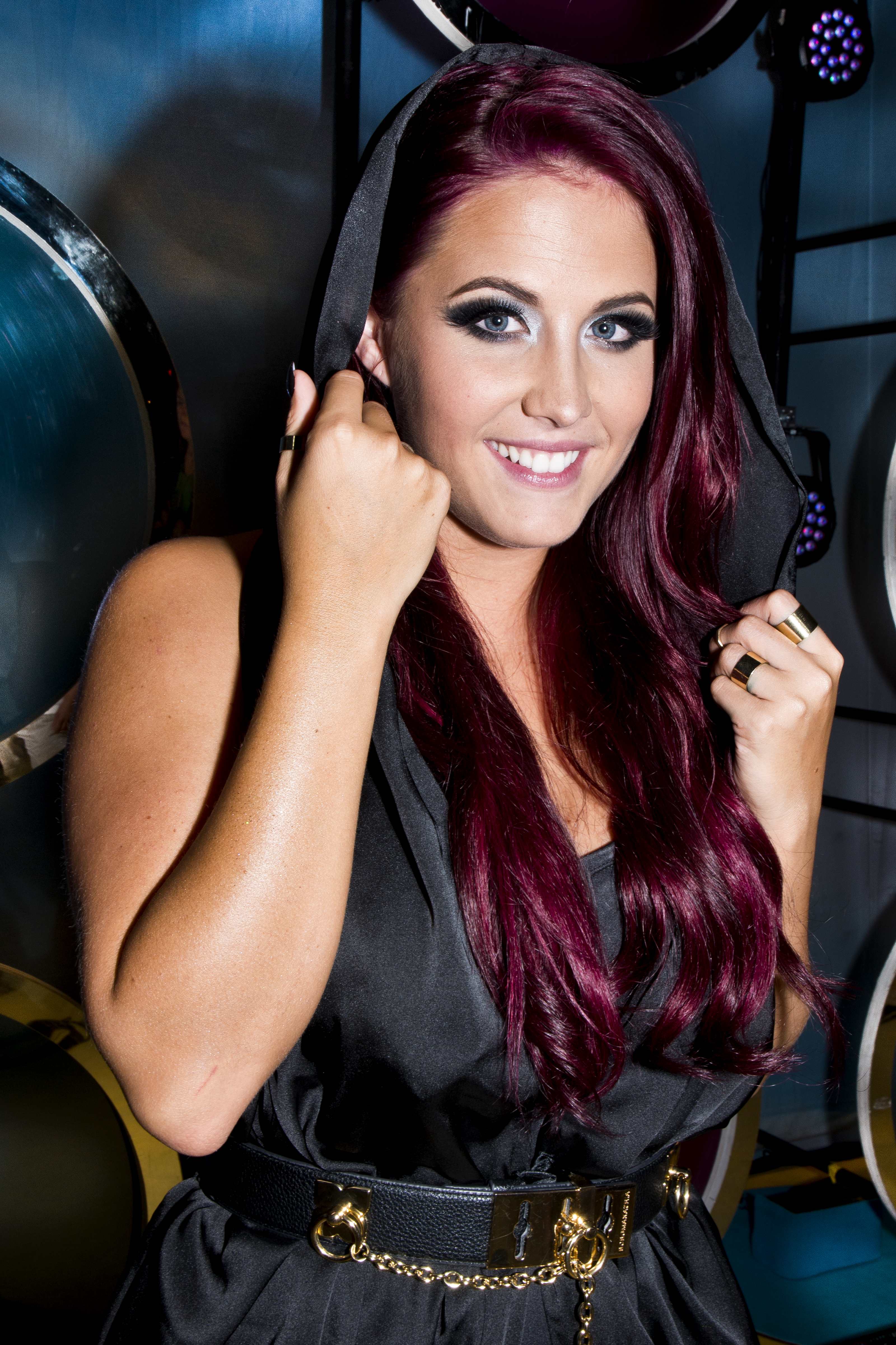 Molly Sandén på Sommarkrysset